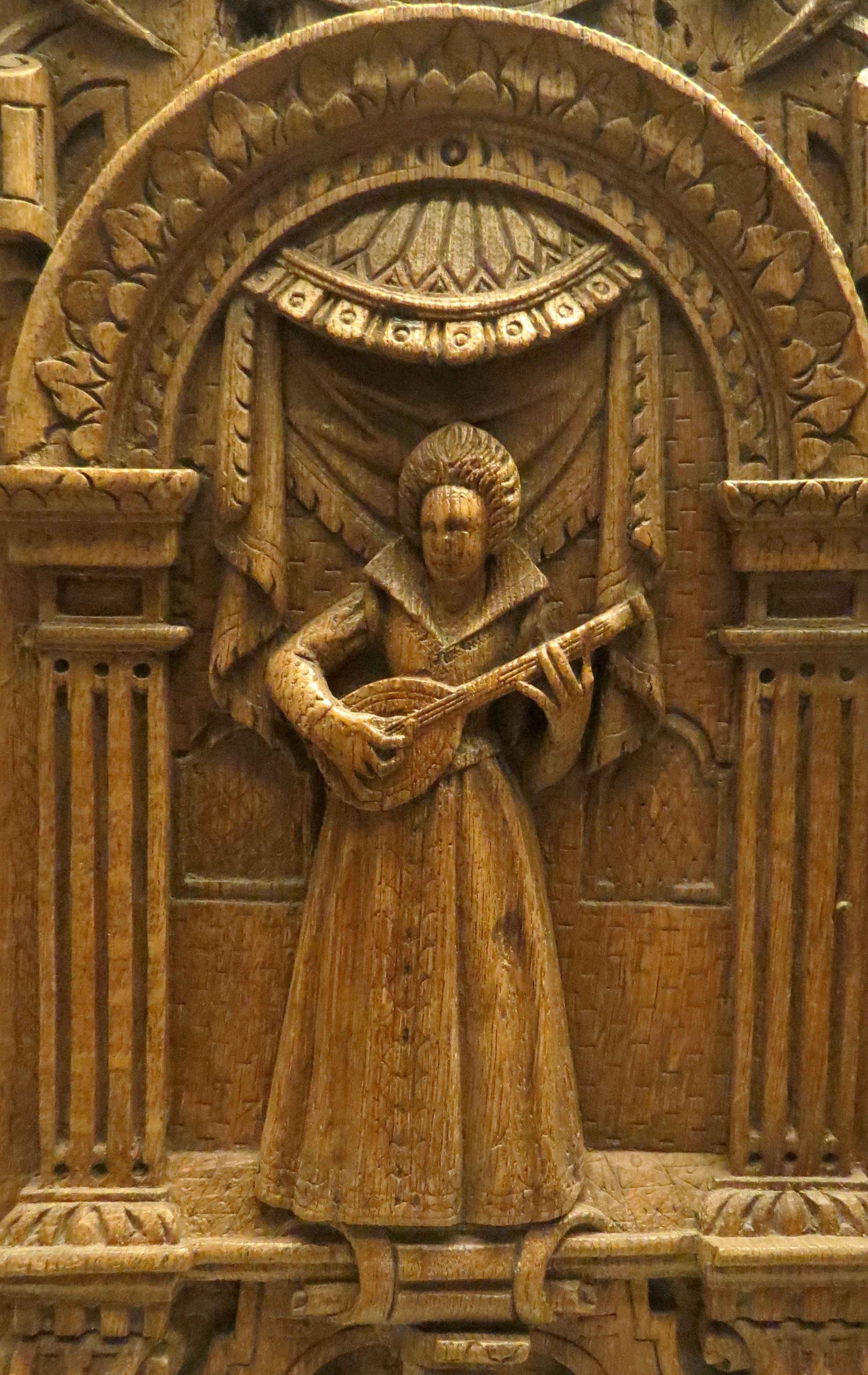 Relief i træ med muciserende kvinde, af Hans Gudewerth d. Æ., fra begyndelsen af det 17. århundrede, Nationalmuseet i København